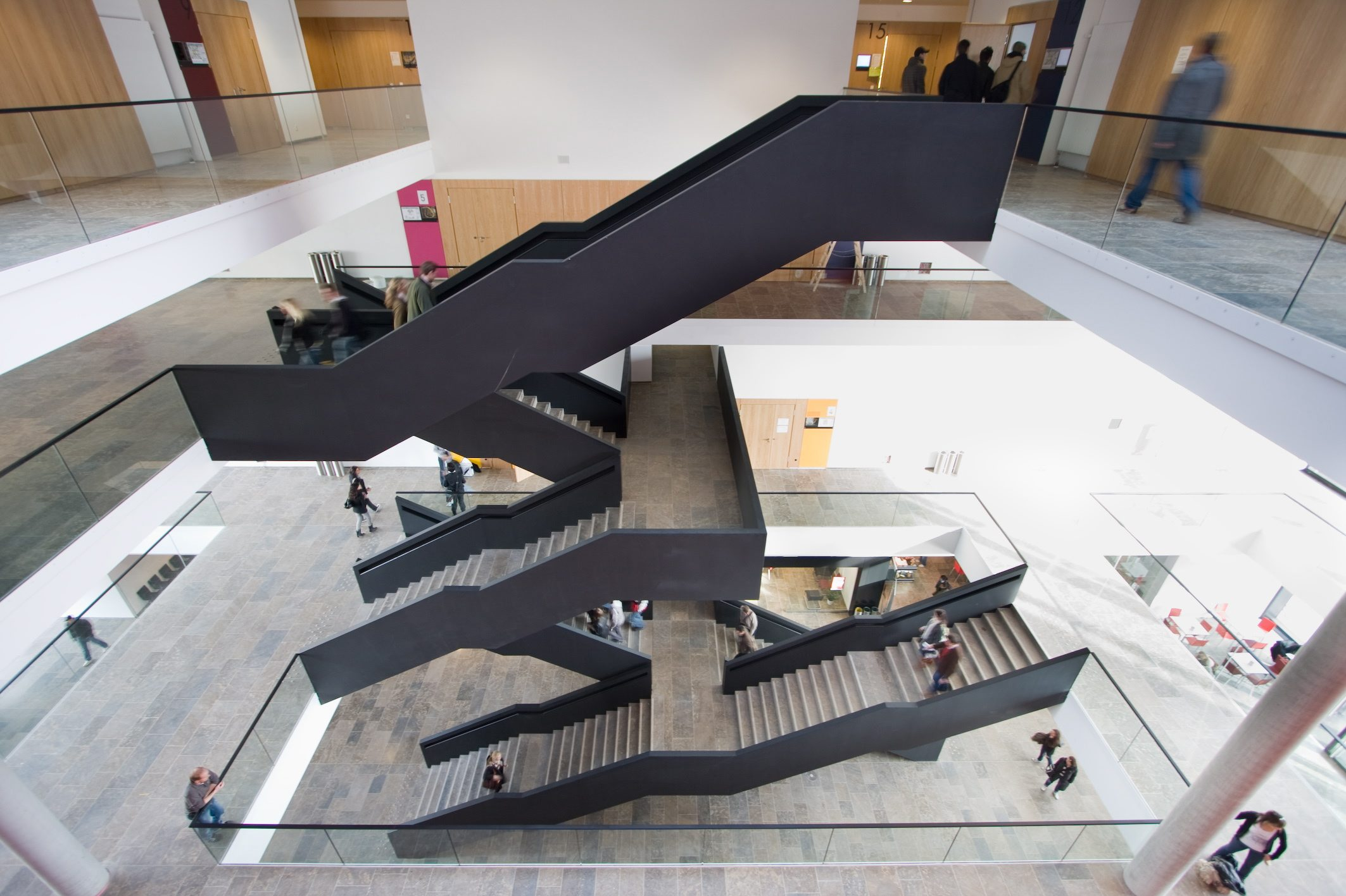 Das neue Hörsaalgebäude des Campus Westend, Universität Frankfurt am Main, 2008